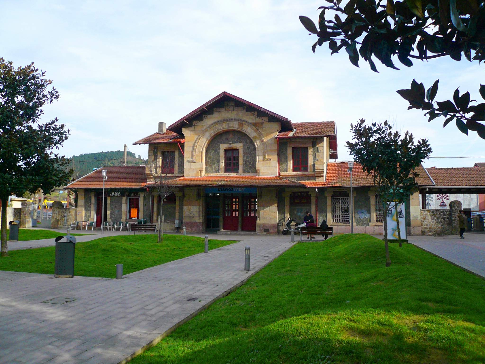 Estación de Euskotren en Guernica